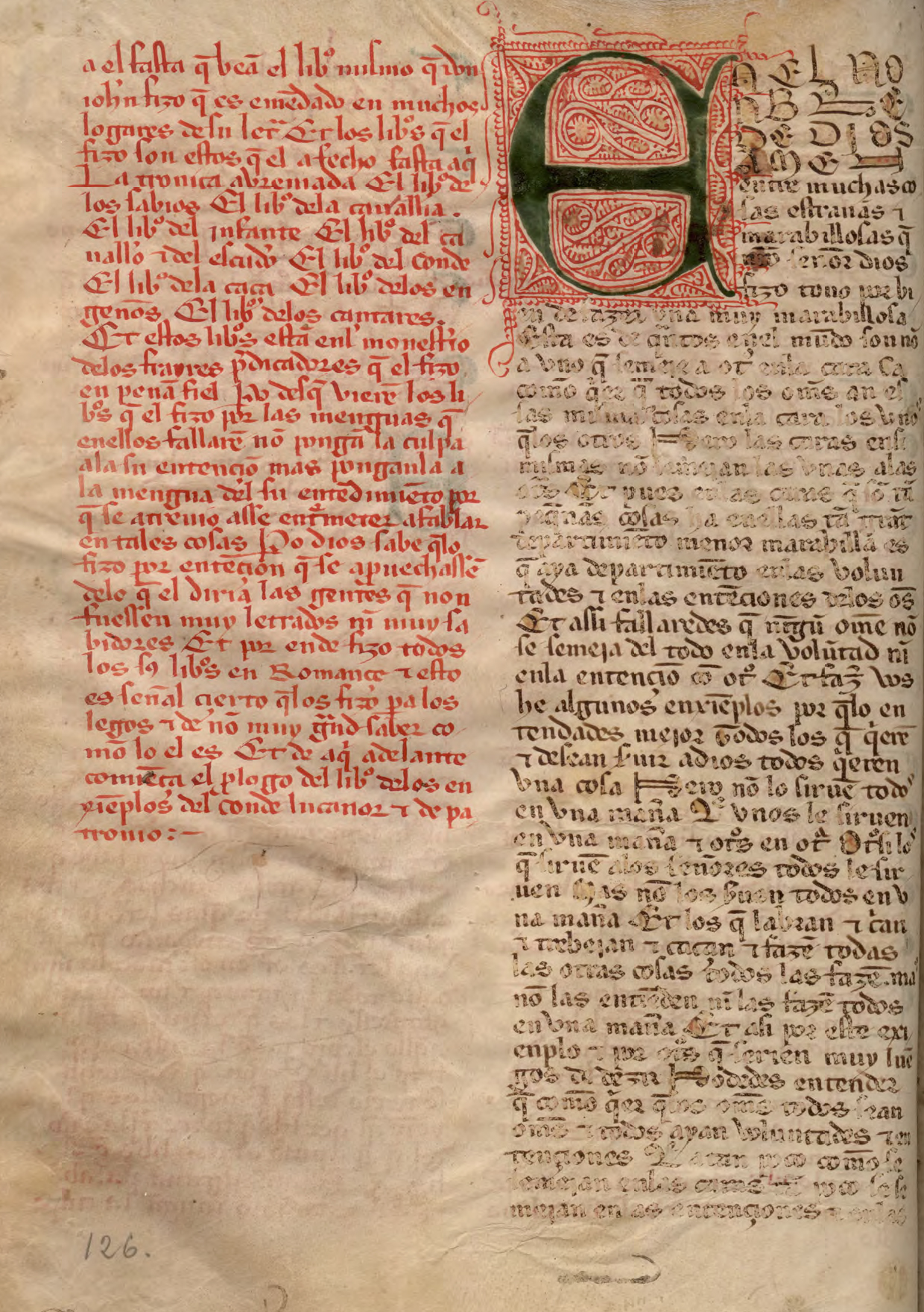 Íncipit del Conde Lucanor, obra escrita por el célebre magnate Don Juan Manuel (1282-1348), hijo del infante Manuel de Castilla y nieto del rey Fernando III el Santo. MSS/6376 de la Biblioteca Nacional de España, fol. 126v. Empieza: En el nombre de Dios. Amen. Entre muchas cosas estrañas et marabillosas Ref